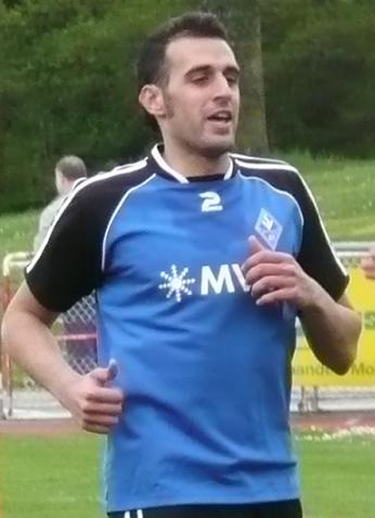 Goivanni Speranza